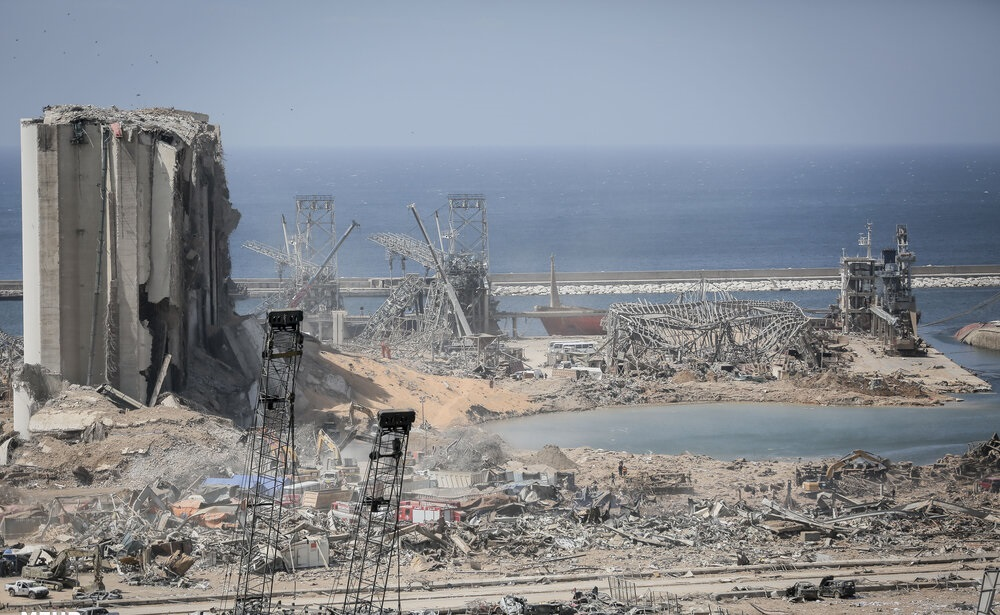 خسارات ها بعد از انفجار بیروت